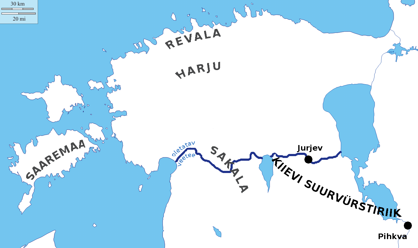 Sossolitega seotud paigad